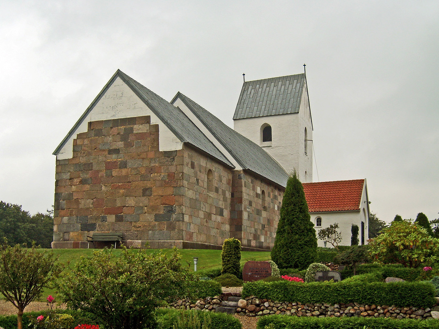 fra nordøst